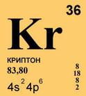 Криптон